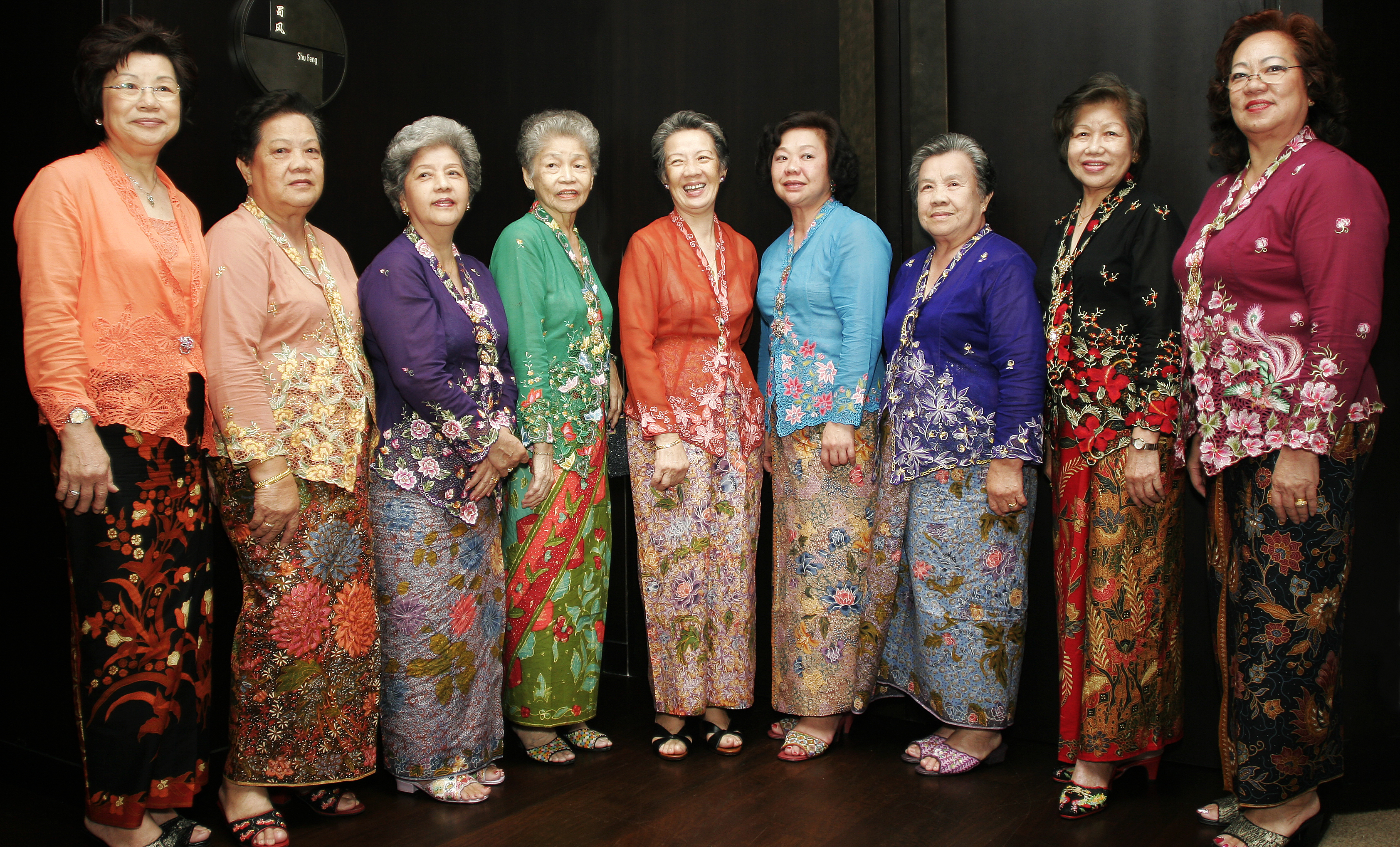 Kebaya